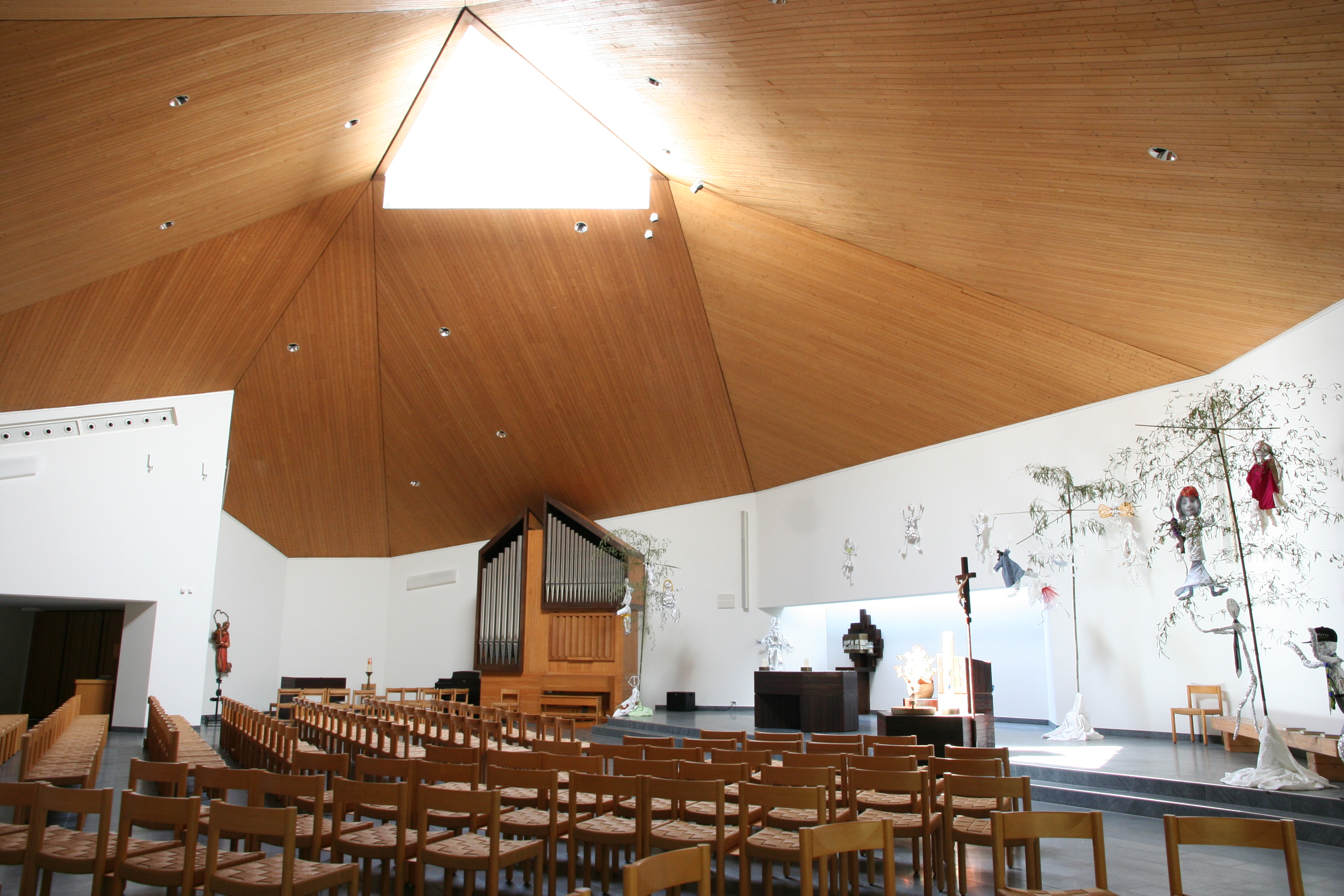 Römisch-katholische Kirche St. Michael Uitikon